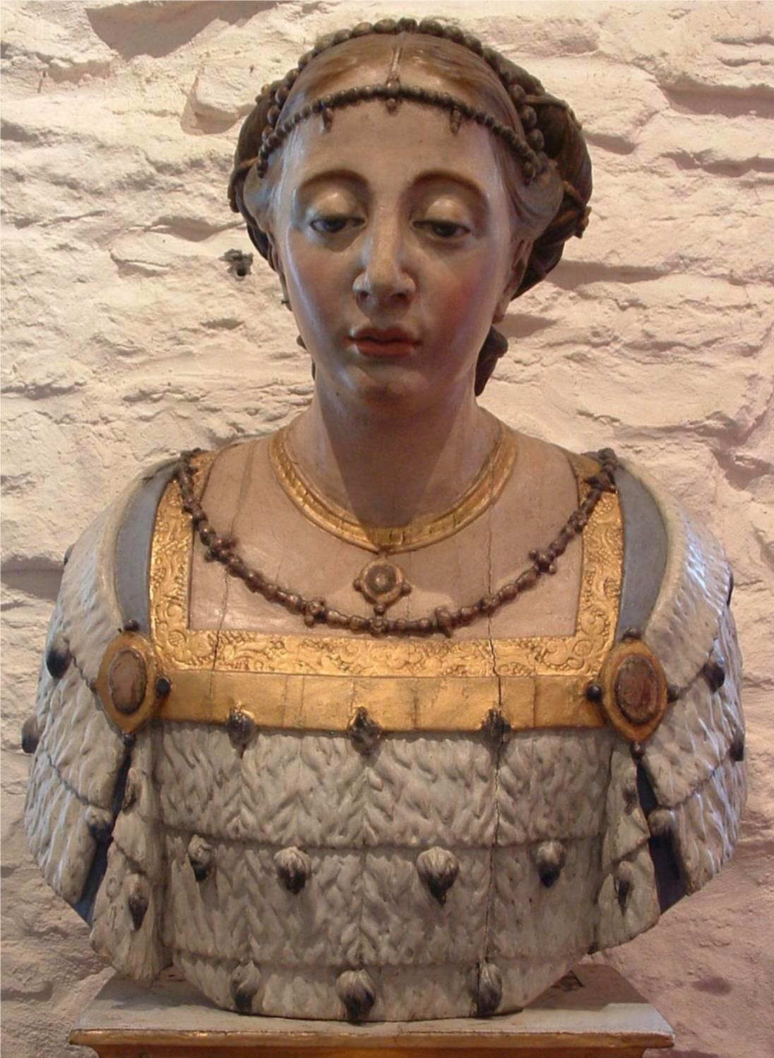 15/08/05 Sint-Waltrudis als gravin van Henegouwen (polychroom beeld uit de 18e eeuw, Musée du Chapitre, Zinnik (Soignies))